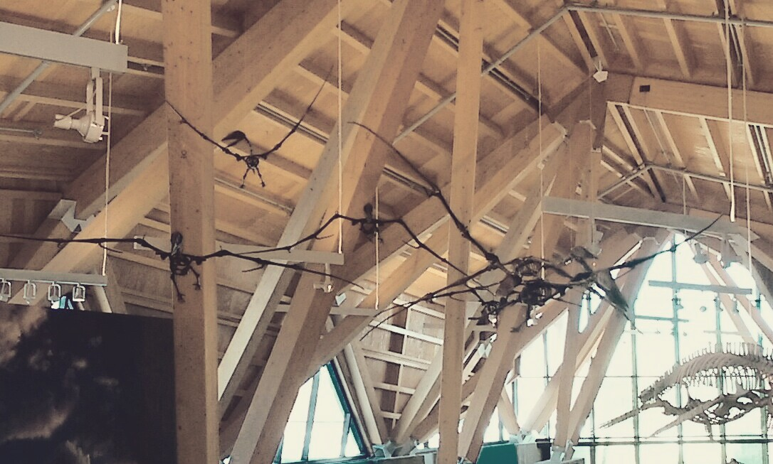 モンタナズダルコ